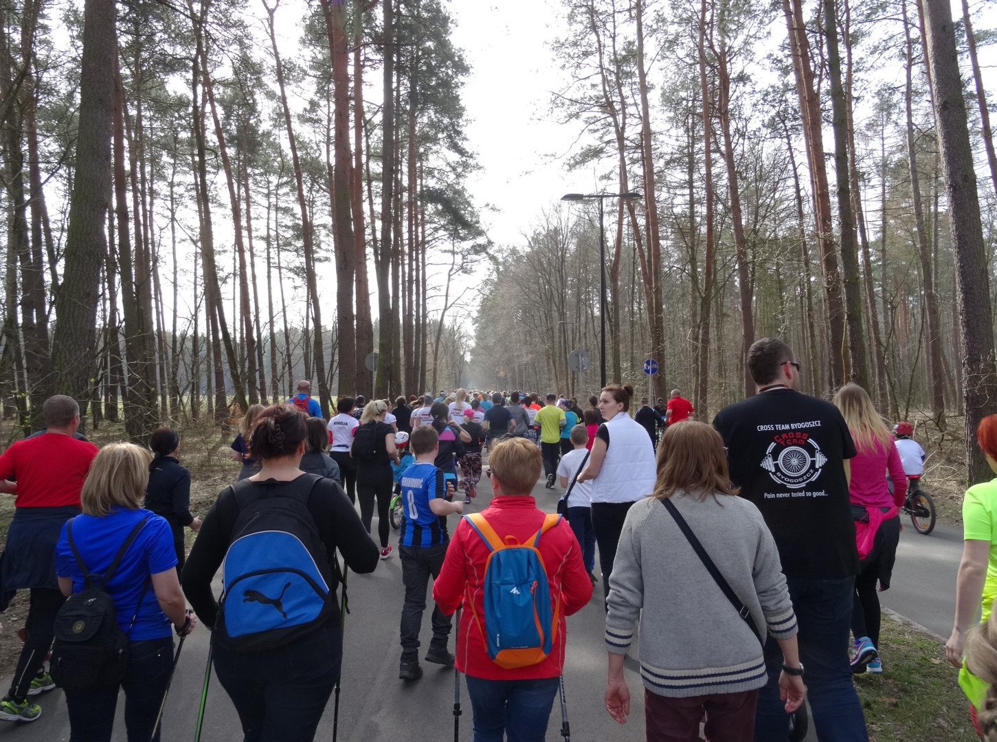 Charytatywny Bieg Bez Ograniczeń w Leśnym Parku Kultury i Wypoczynku w Bydgoszczy